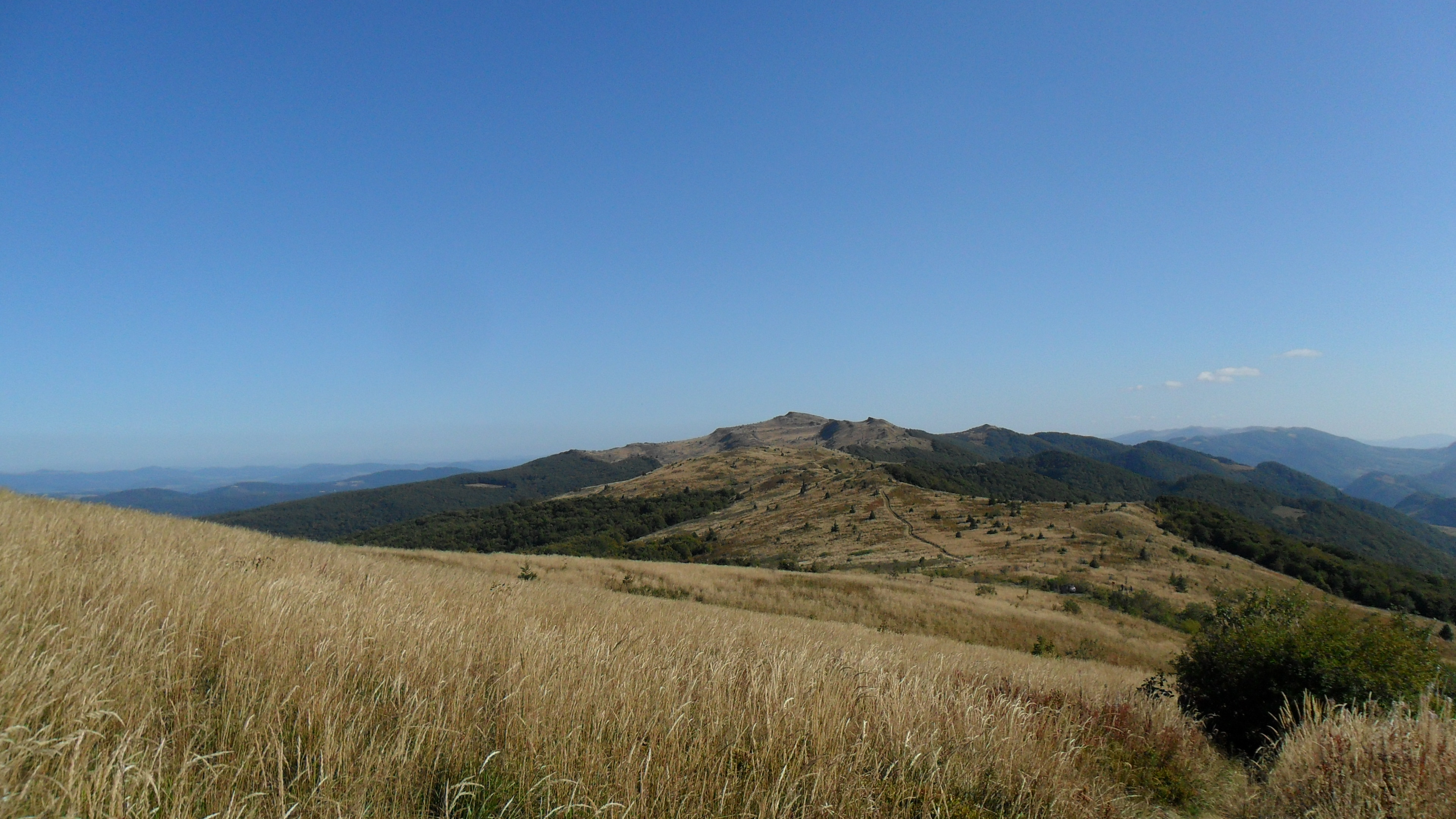 Kińczyk i Stińska widzane z Rozsypańca